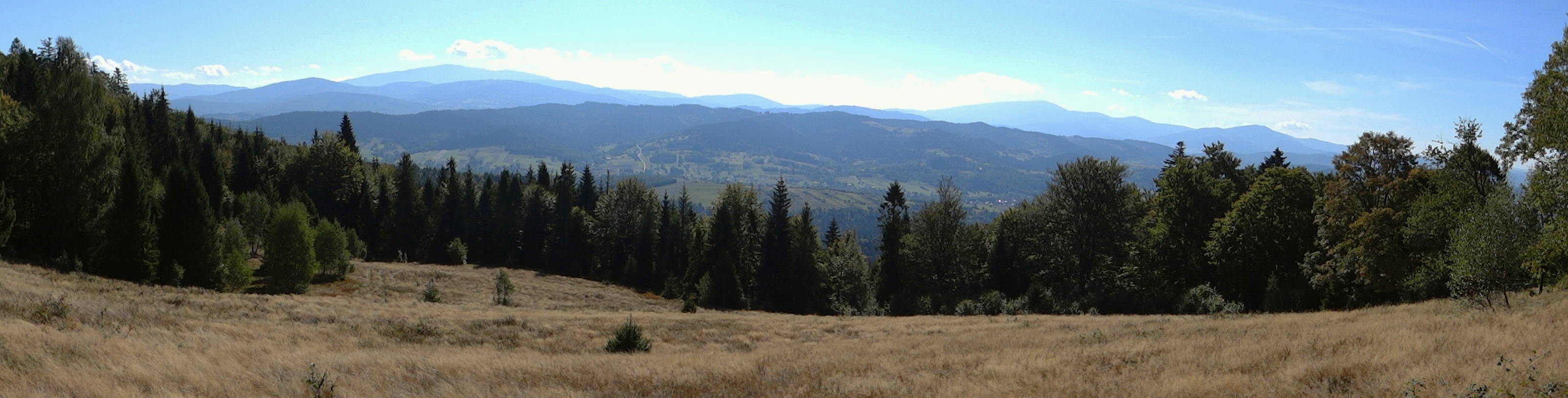 Widok na południe z polany poniżej przełęczy skolarówka w Beskidzie Małym